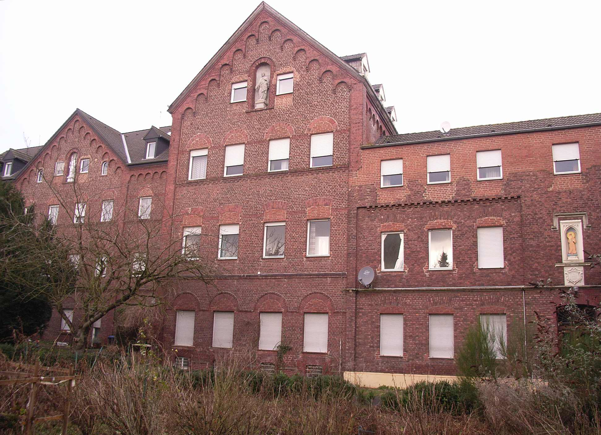 Haus Nazarteh, Erkelenz-Immerath, NRW